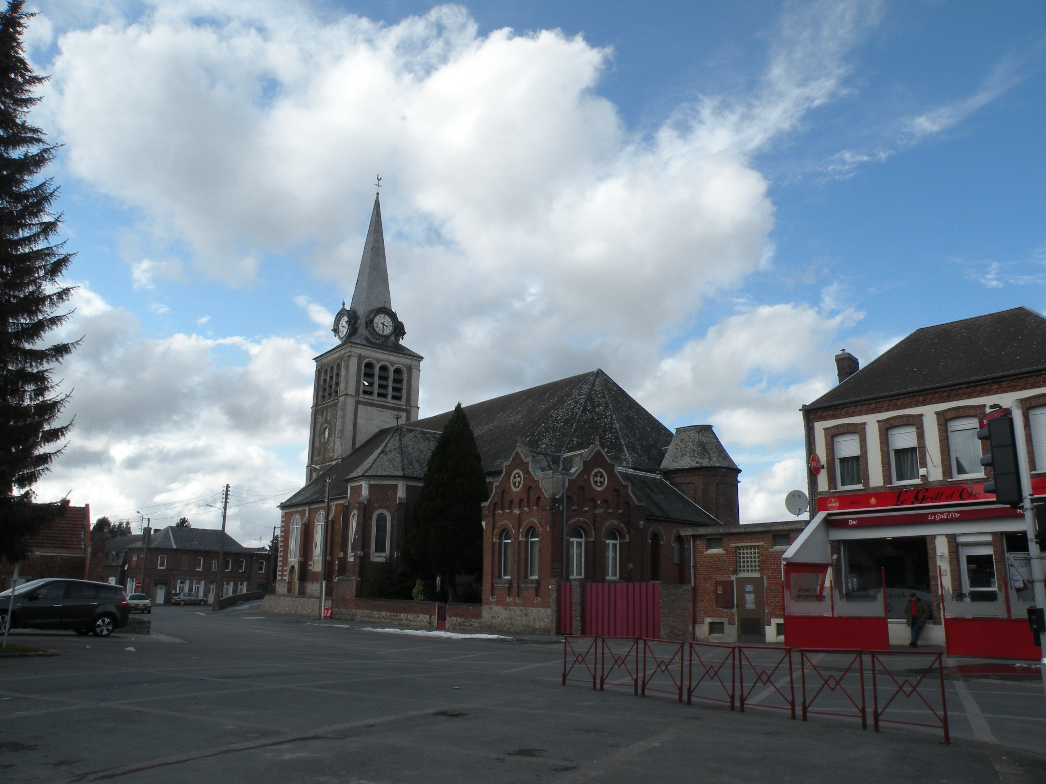 Iwuy église